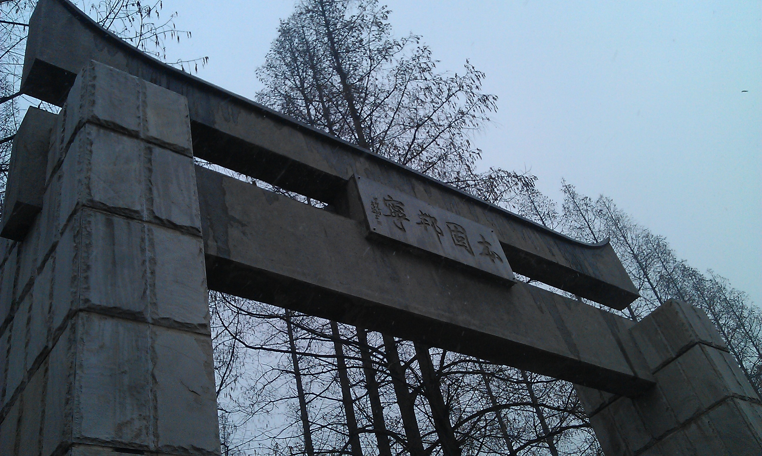 邳州人民公园牌坊